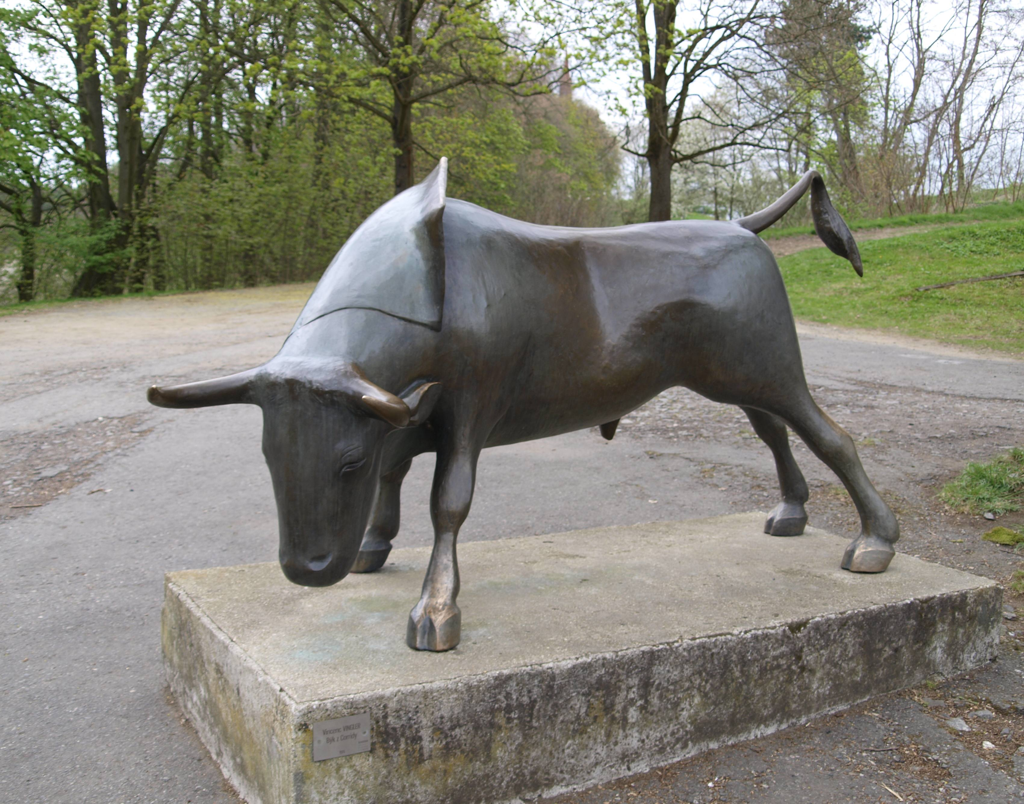 Project: Fotíme Česko. Klenová, okres Klatovy, bronzová plastika před sýpkou, autor Vincenc Vingler, 60. léta 20. stol.